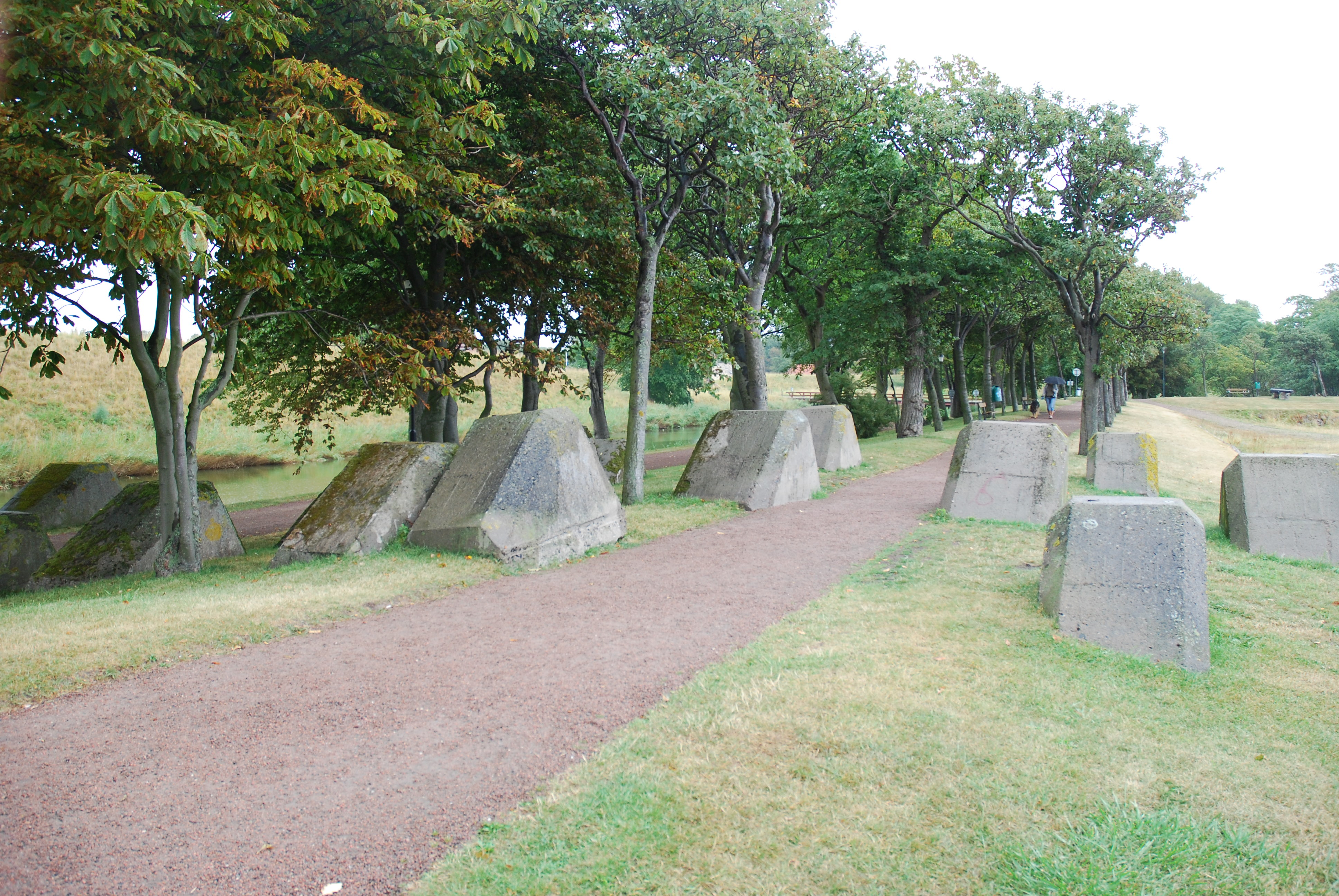 Stridsvagnshinder i Skånelinjen (Per Albin Hanssonlinjen), Landskrona Dragon´s teeth fortification from Second World War, Landskrona, Sweden